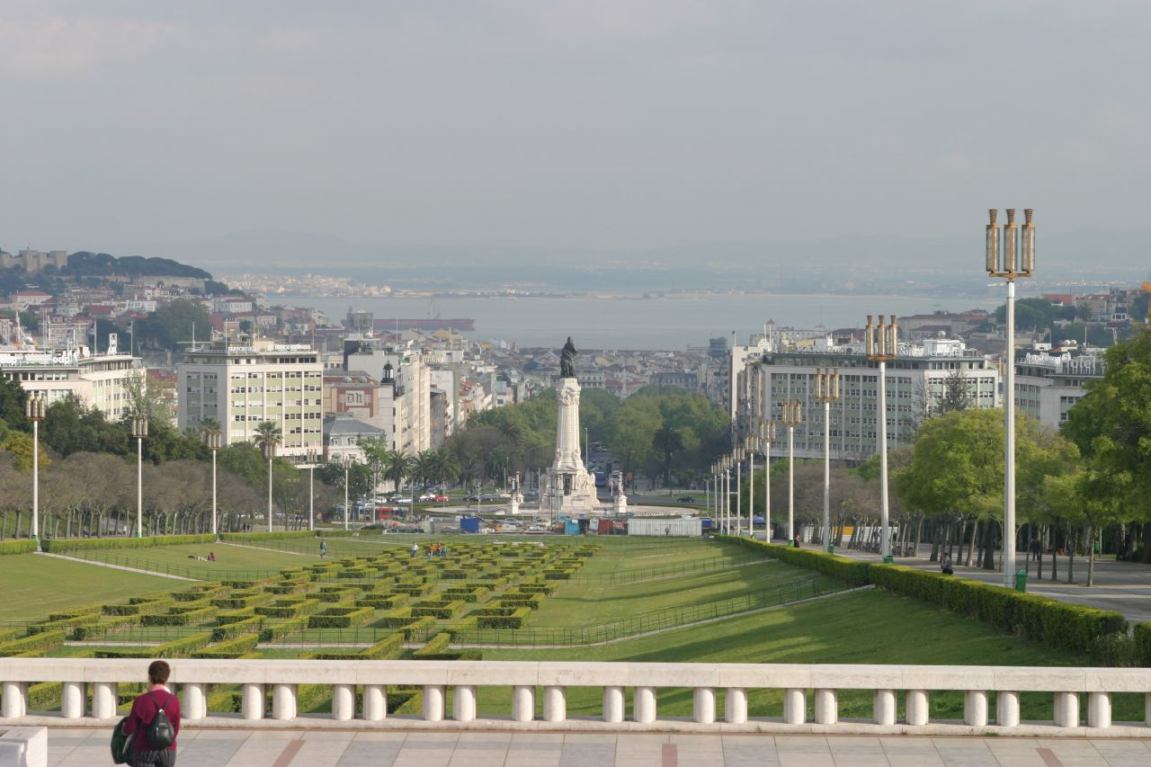 Eduardo IV Park in Lisbon, Portugal (Arq. Keil do Amaral)